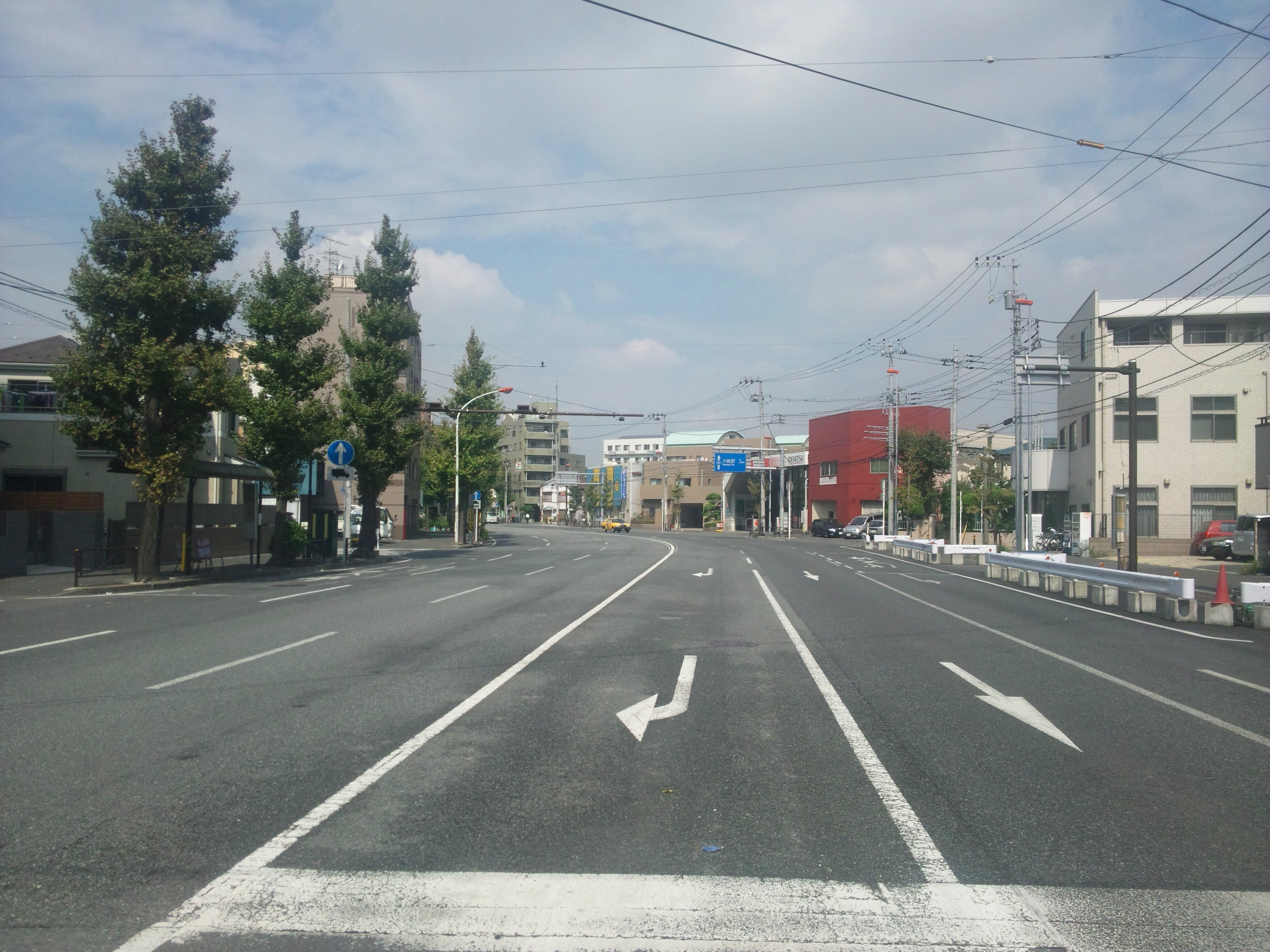 神奈川県道101号（浜町交差点付近にて）